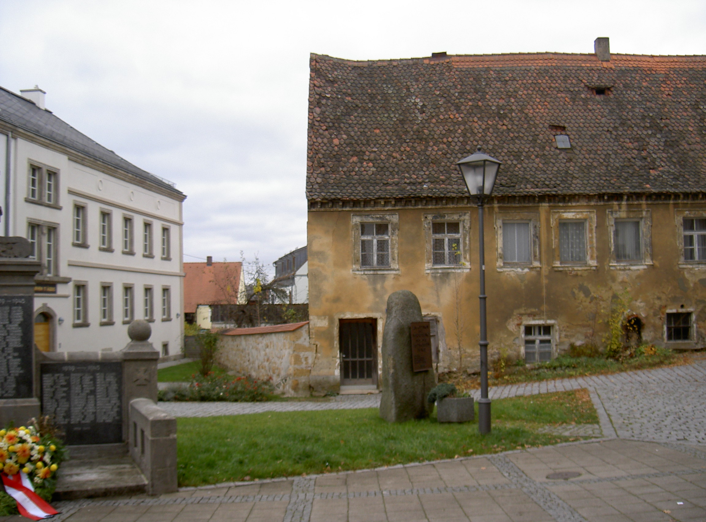 Vilseck Klostergasse 12